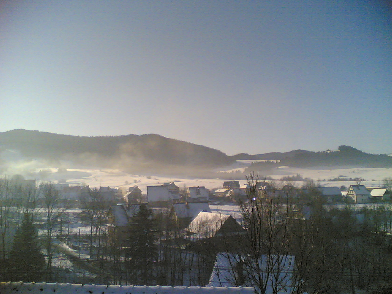 Konina-Zimowy krajobraz. Targeo